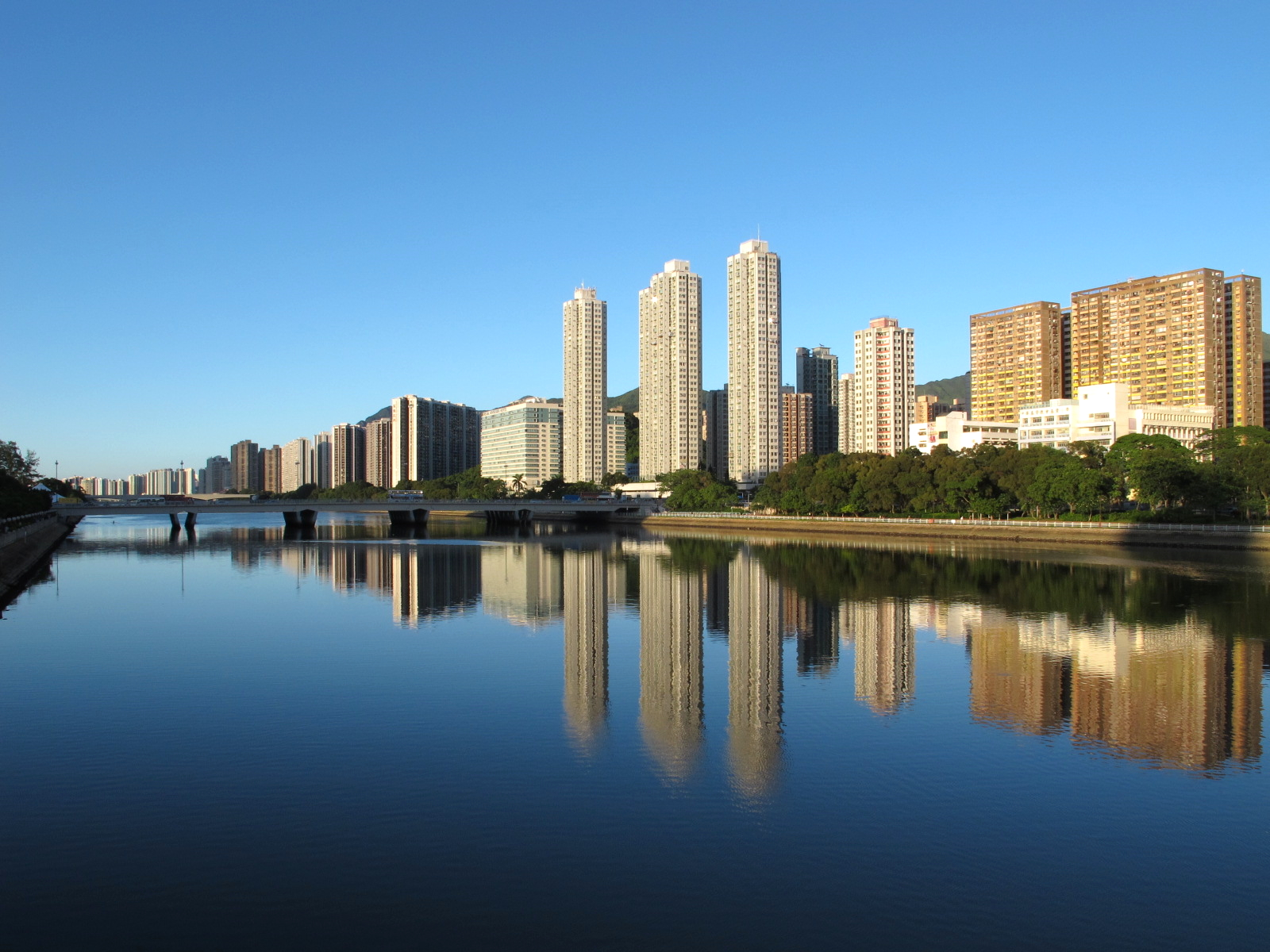 Shing Mun River Dusk